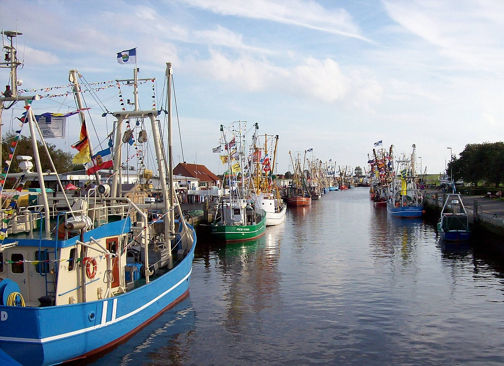 Friedrichskoog (Germany) Hafen, Kutterragatta